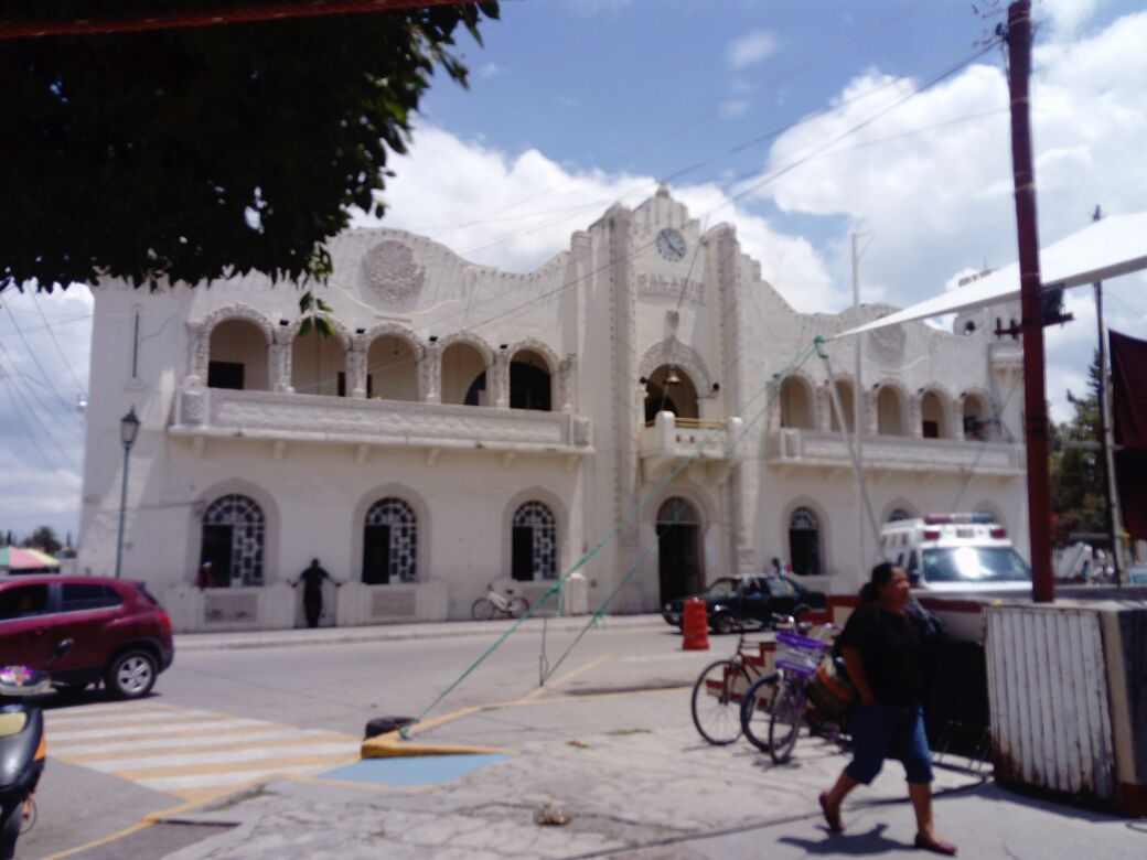 Tepatepec, HIdalgo, México